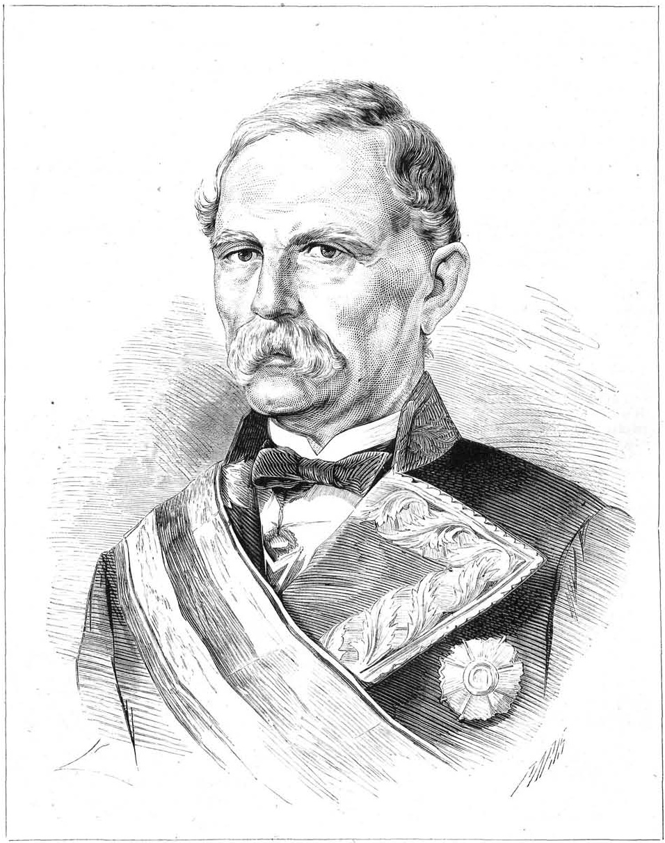 Manuel de la Serna, jefe del Estado Mayor del Ejército del Norte. Grabado de Marcelo Paris para La Ilustración Española y Americana, 15 de diciembre de 1874